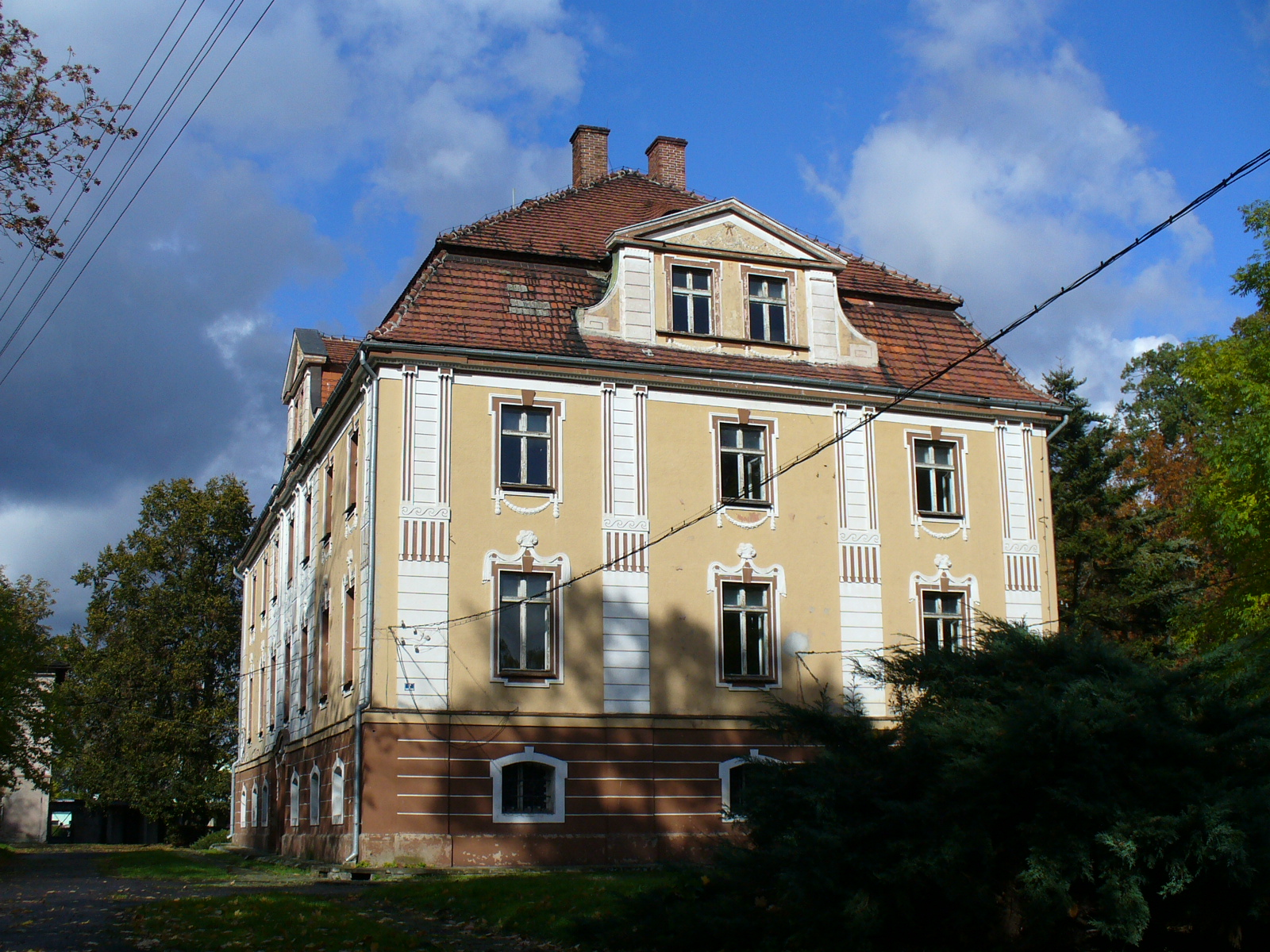 Schloss in Schönwitz (Oberschlesien) / Zamek w Karczowie (Górny Śląsk)